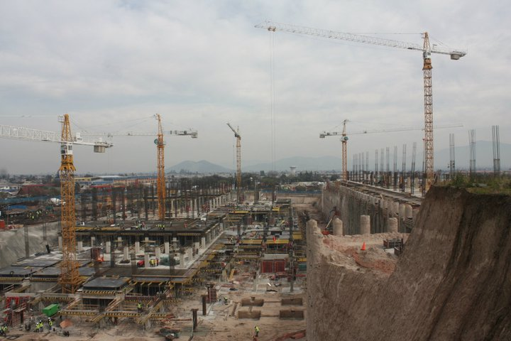 El sitio de la construcción del Hospital del Carmen, en la comuna de Maipú. Fotografía tomada el 27 de julio de 2011, durante una visita de autoridades y vecinos de la comuna.